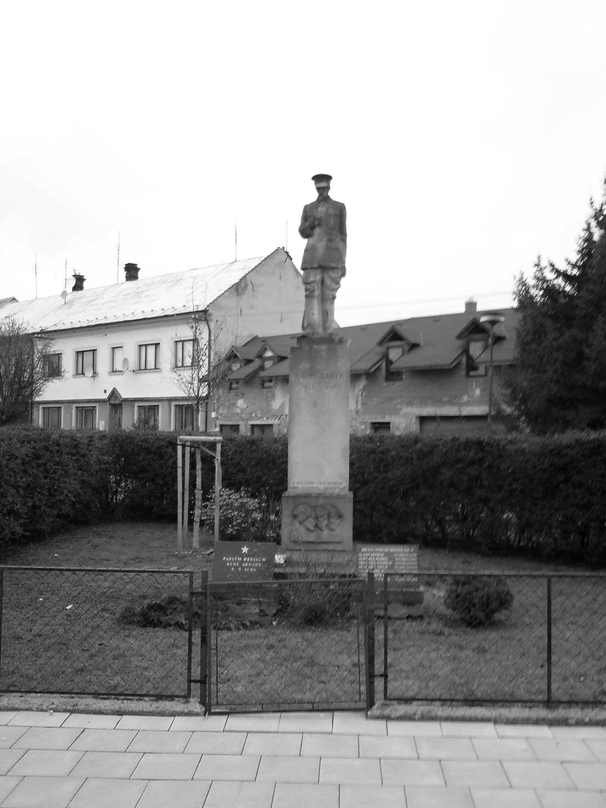 Pomník T.G.Masaryka v Bukovanech